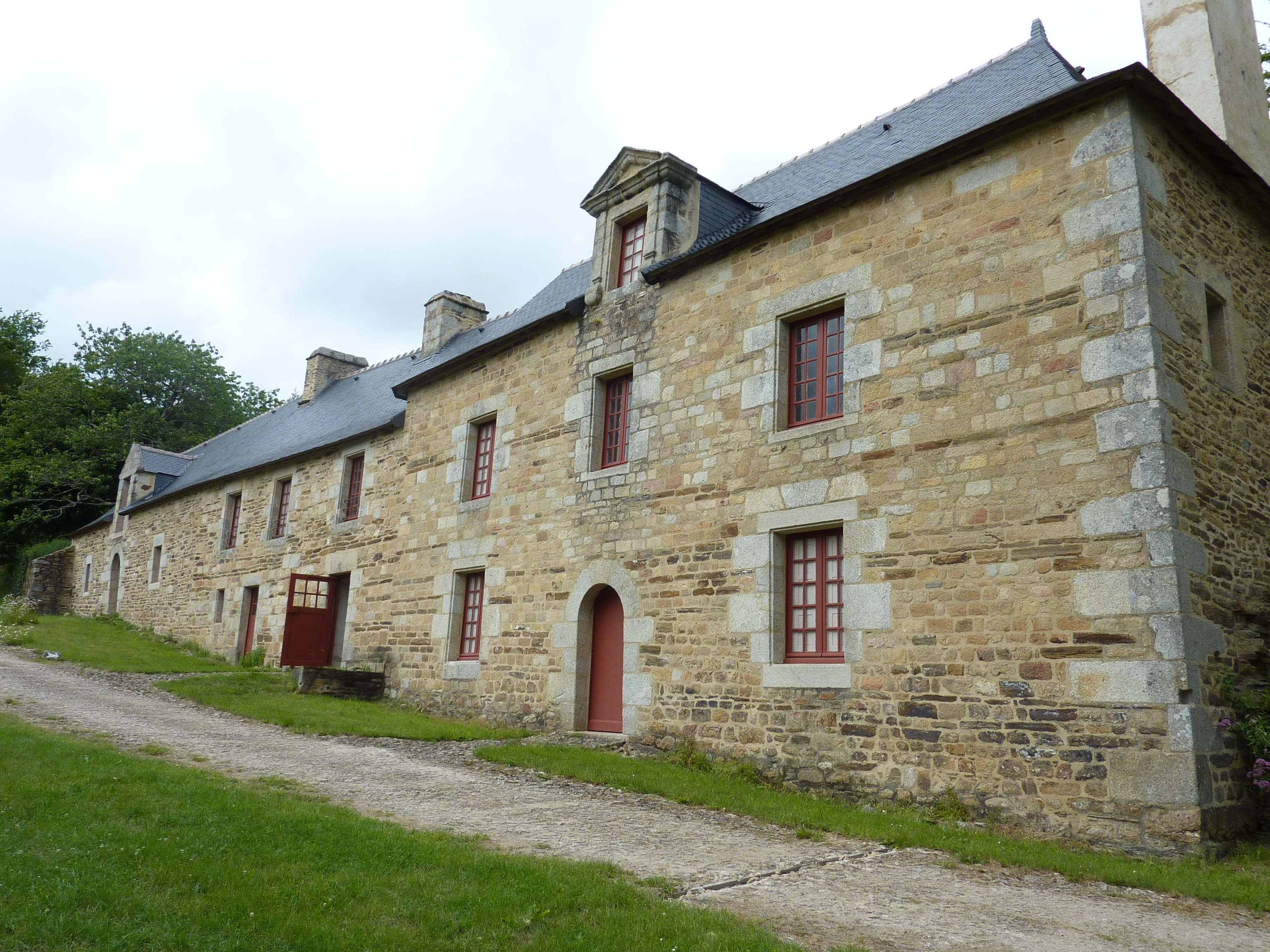 Abbaye Saint-Maurice de Carnoët Le logis de l'Abbé XVIIIème siècle